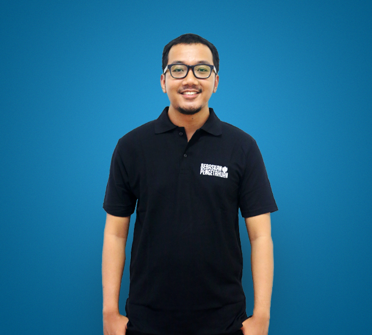 Adien, staf komunikasi